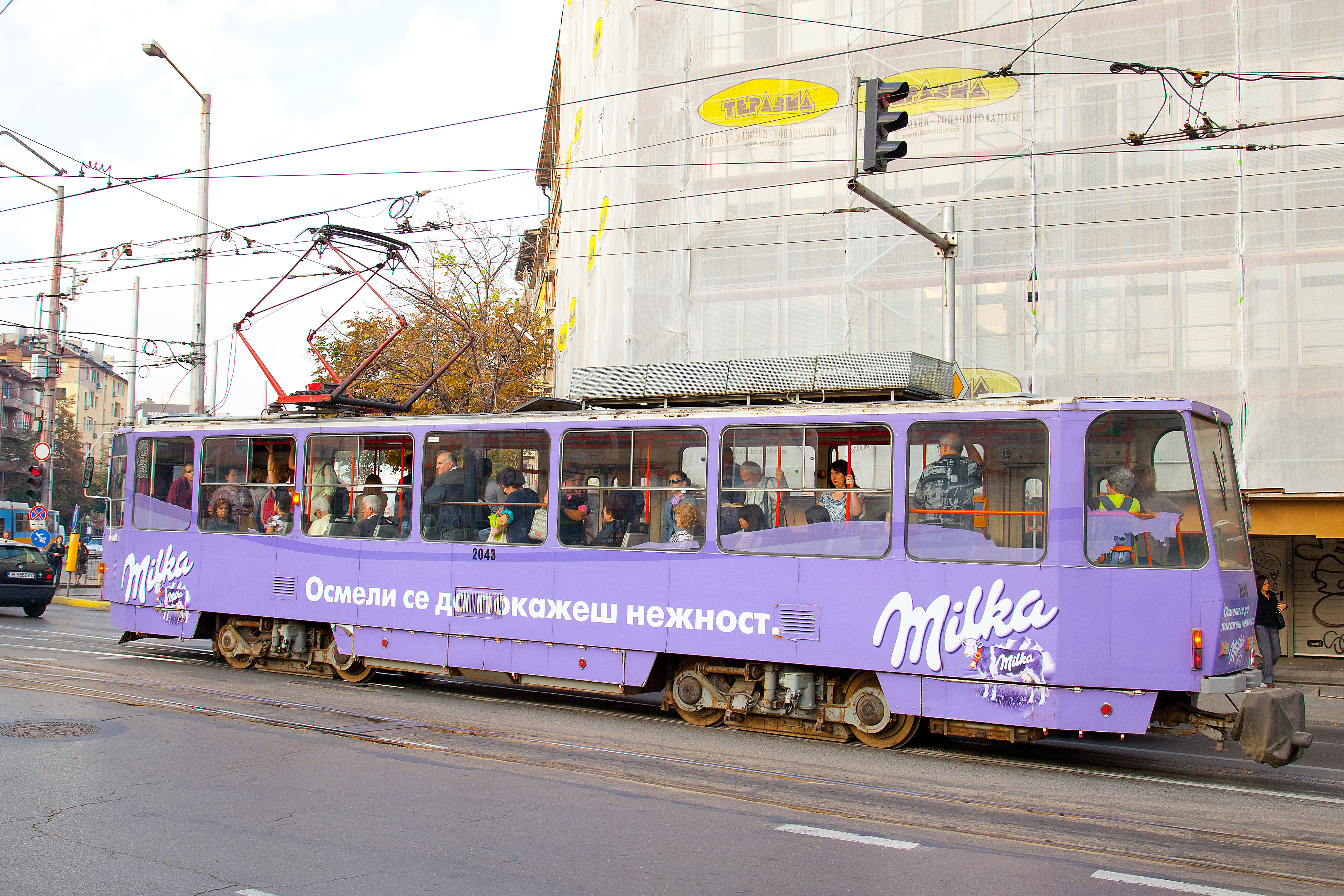 Straßenbahn in Sofia